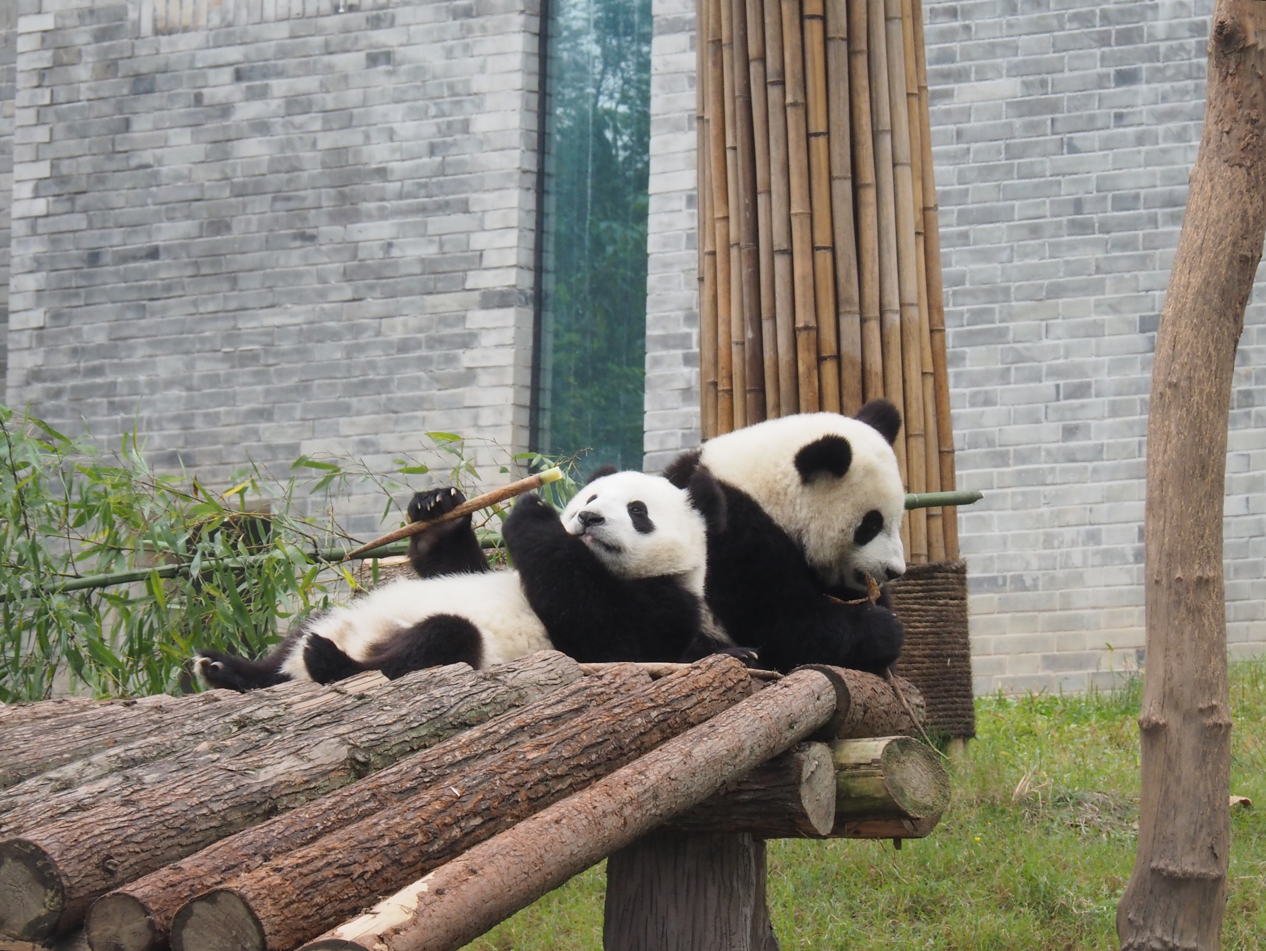 Dujiangyan Giant Panda Center